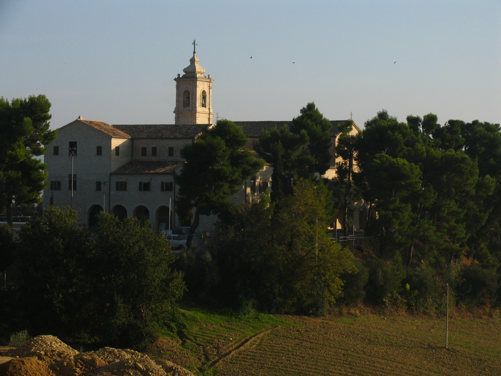 Santuario Santa Maria delle Grazie Monteprandone, Marche, ItaliaSantuario Santa Maria delle Grazie